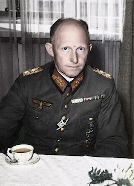 Alfred Jodl OKW:n johtoesikunnan päällikkö.